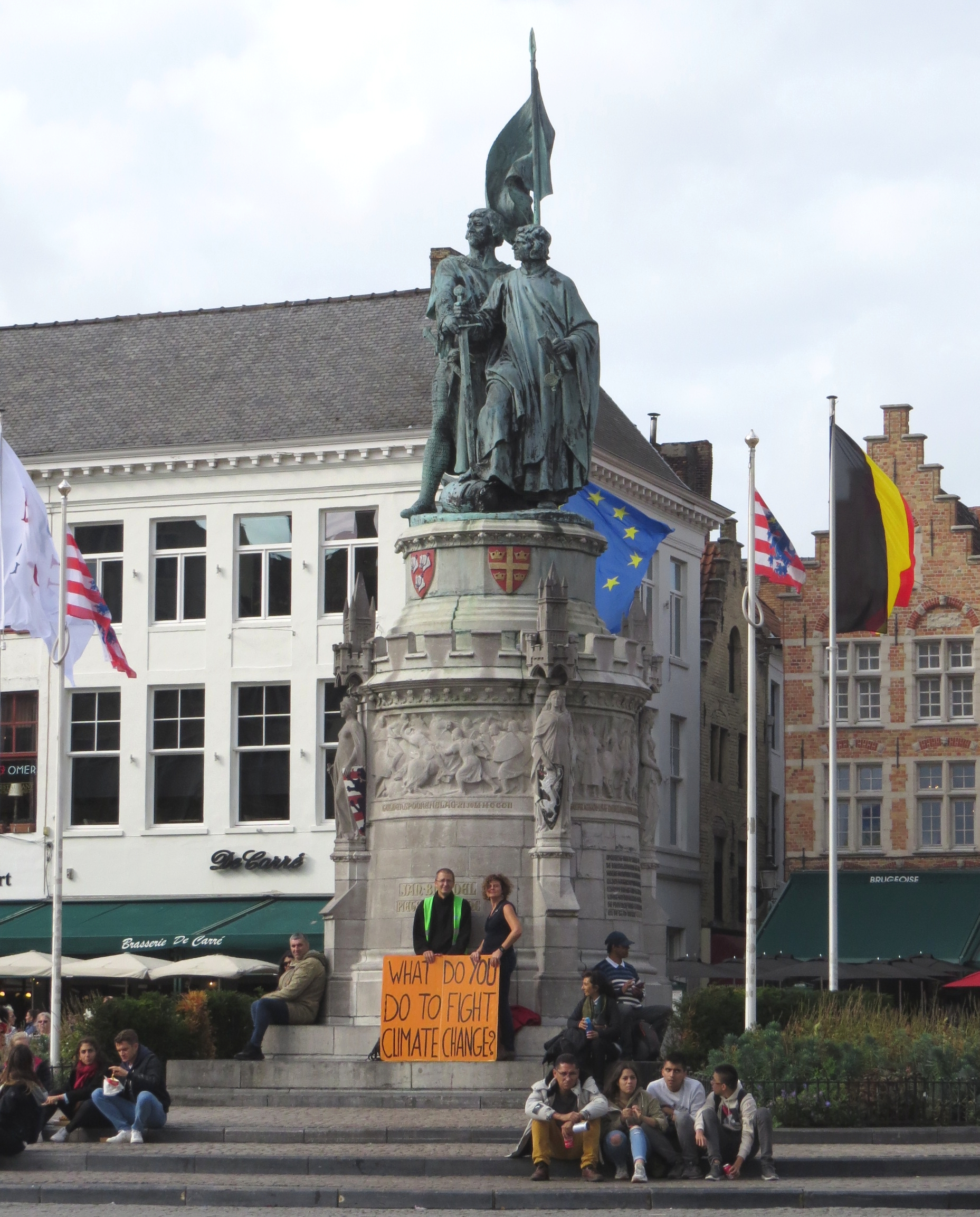 Brügge in Belgien, Grote Markt, Denkmal für Breydel und Coninck